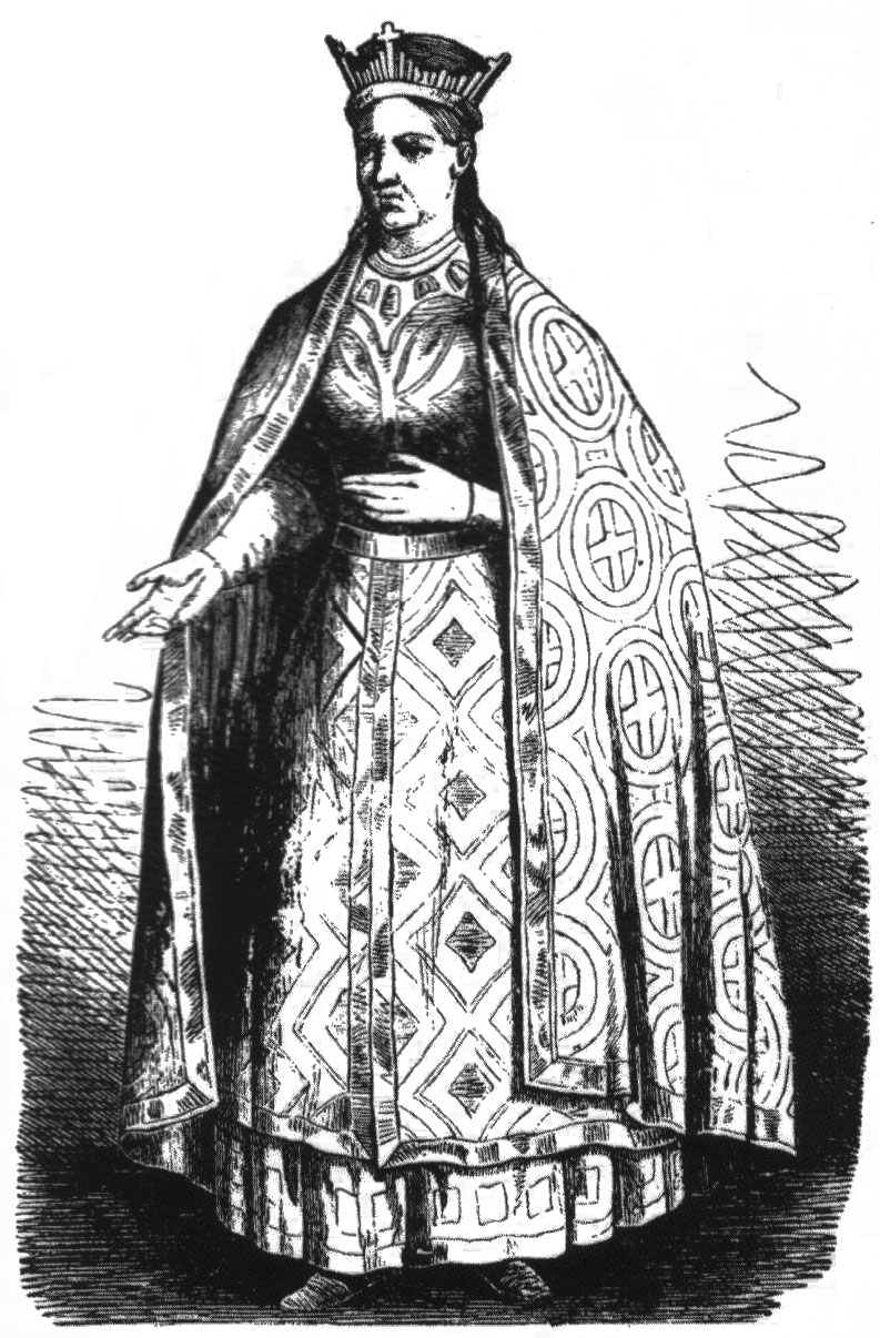 Беларуская (тарашкевіца): Партрэт Соф’і Вітаўтаўны (Sofja Vitaŭtaŭna). Малюнак XIX ст. паводле вышыўкі XV ст.